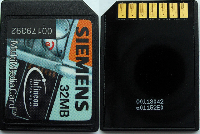 Dieses Bild zeigt eine Multimedia Card - 32 MB - Marke: Siemens/Infineon - aus Siemens SL45i Mobiltelefon.